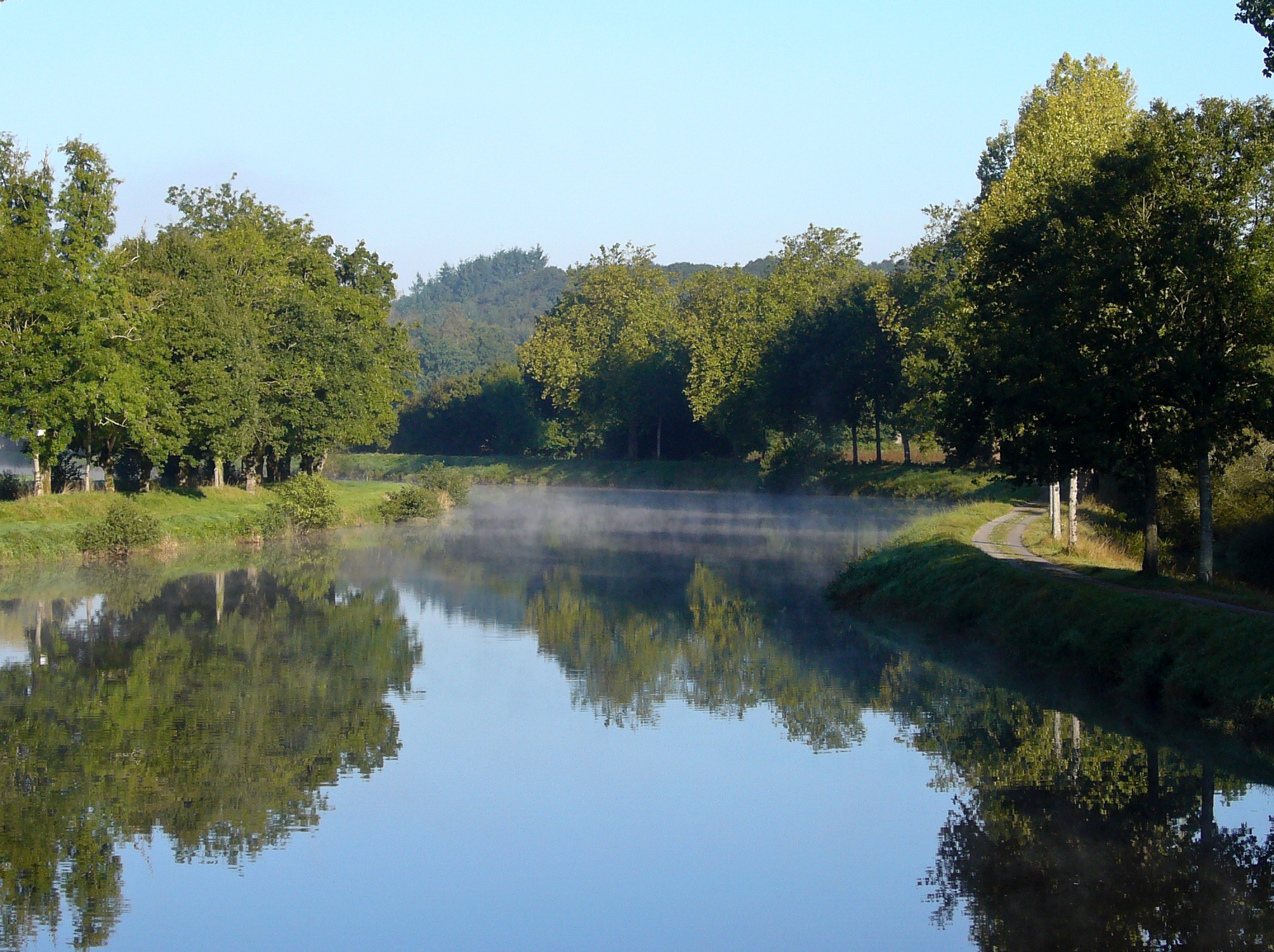 The Aulne (& Paris-Brest canal) near Chateauneuf du Faou.